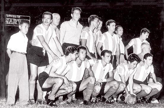 Argentina national team –nicknamed Los Carasucias– that won the 1957 South American championship in Lima, winning 5 of 6 matches. Players are, f.l.t.r (standing): Juan Carlos Giménez, Guillermo Stábile (coach), Rogelio Domínguez, Pedro Dellacha, Néstor Rossi, Federico Vairo, Ángel Schandlein; (bent): Orestes Corbatta, Humberto Maschio, Antonio Angelillo, Enrique Sívori, Osvaldo Cruz.